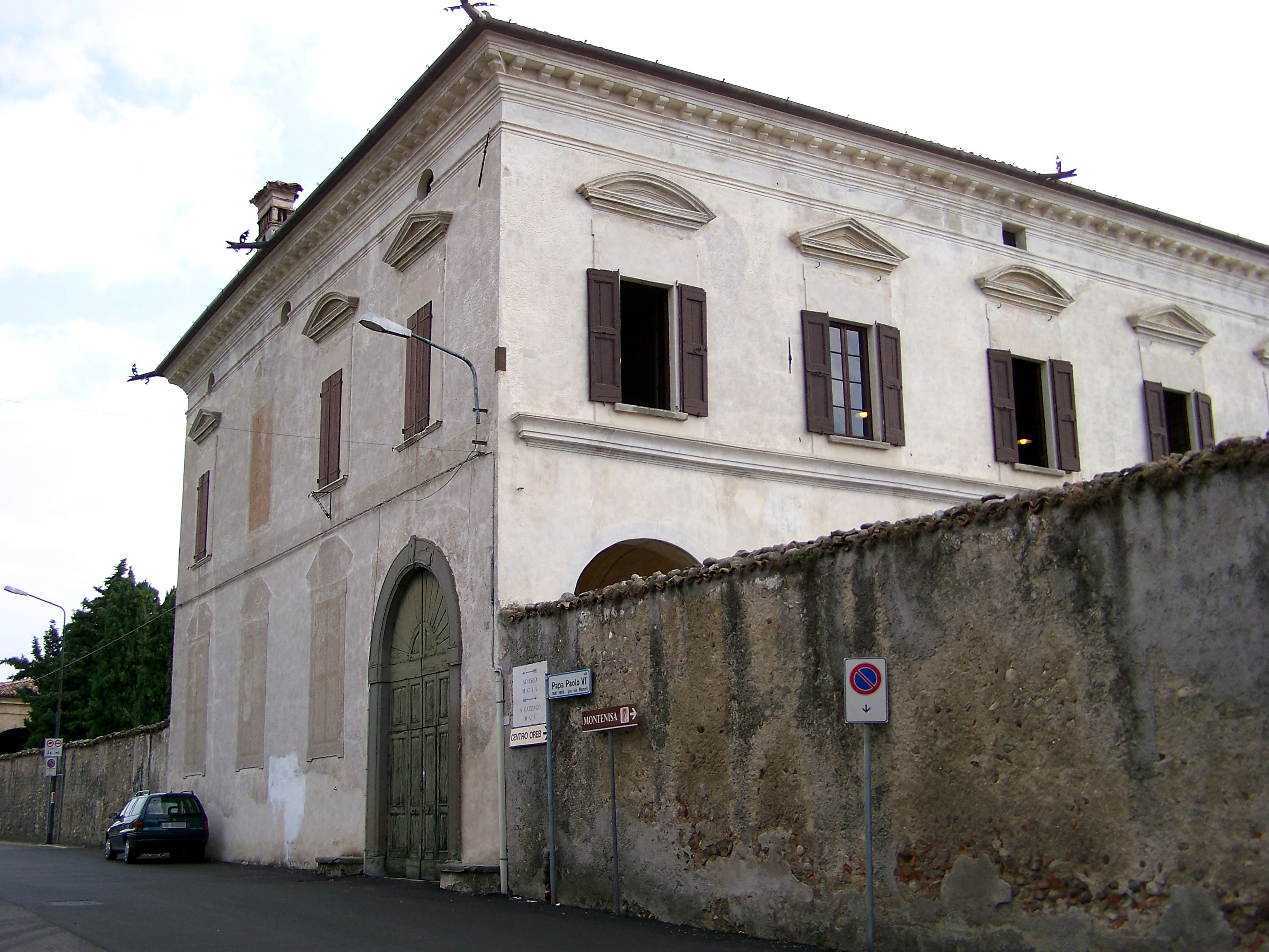 Il Palazzo Calini-Maggi detto anche Palazzo Calini Piccolo visto da sud-ovest.